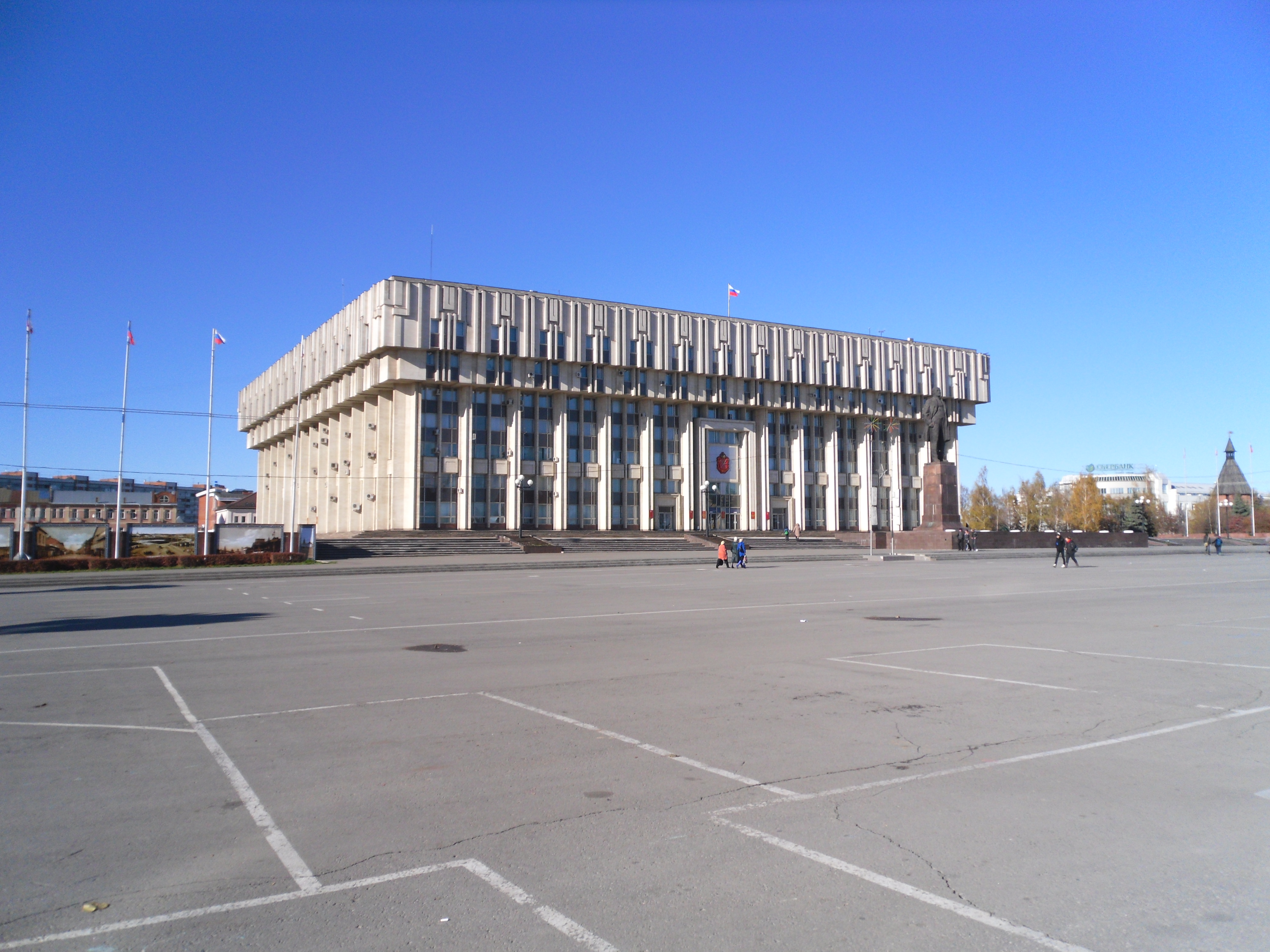 Тула. Здание областной администрации.